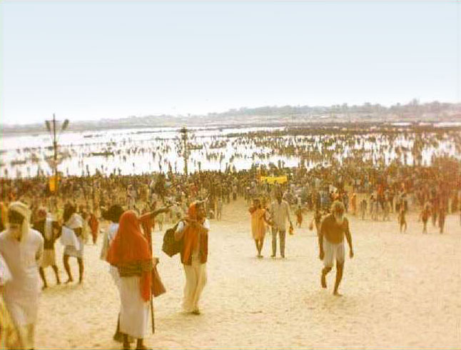 Photo by Hanumandas -Triveni Sangham - Kumbha Mela - Allahabad January 2001, India